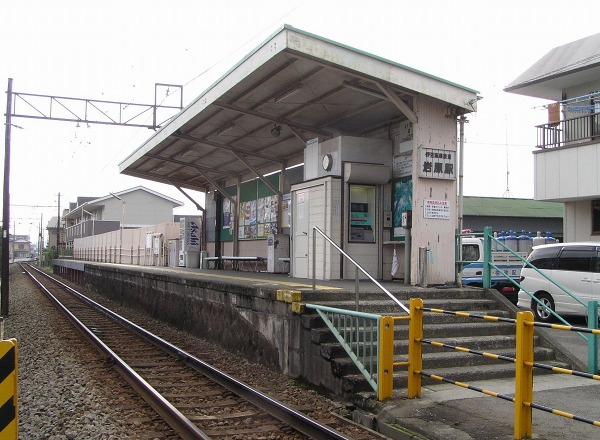 Iwahara Station, on the Izuhakone Daiyūzan Line, Odawara, Kanagawa 岩原駅